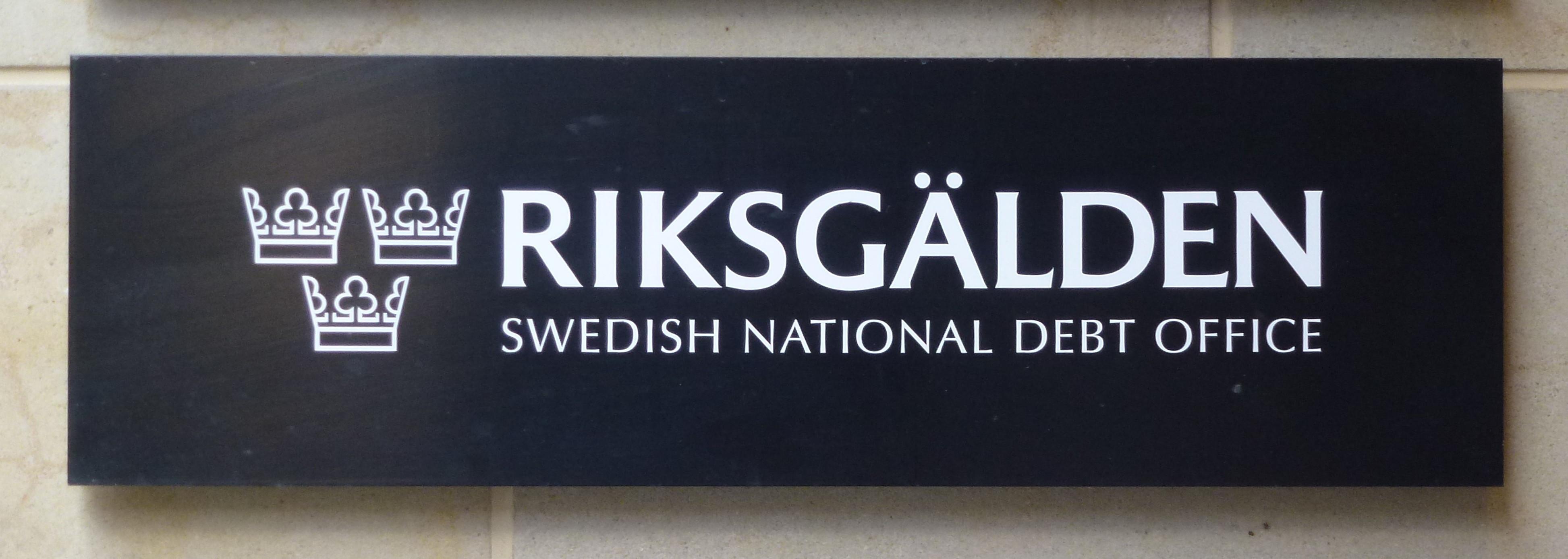 Riksgälden skylt